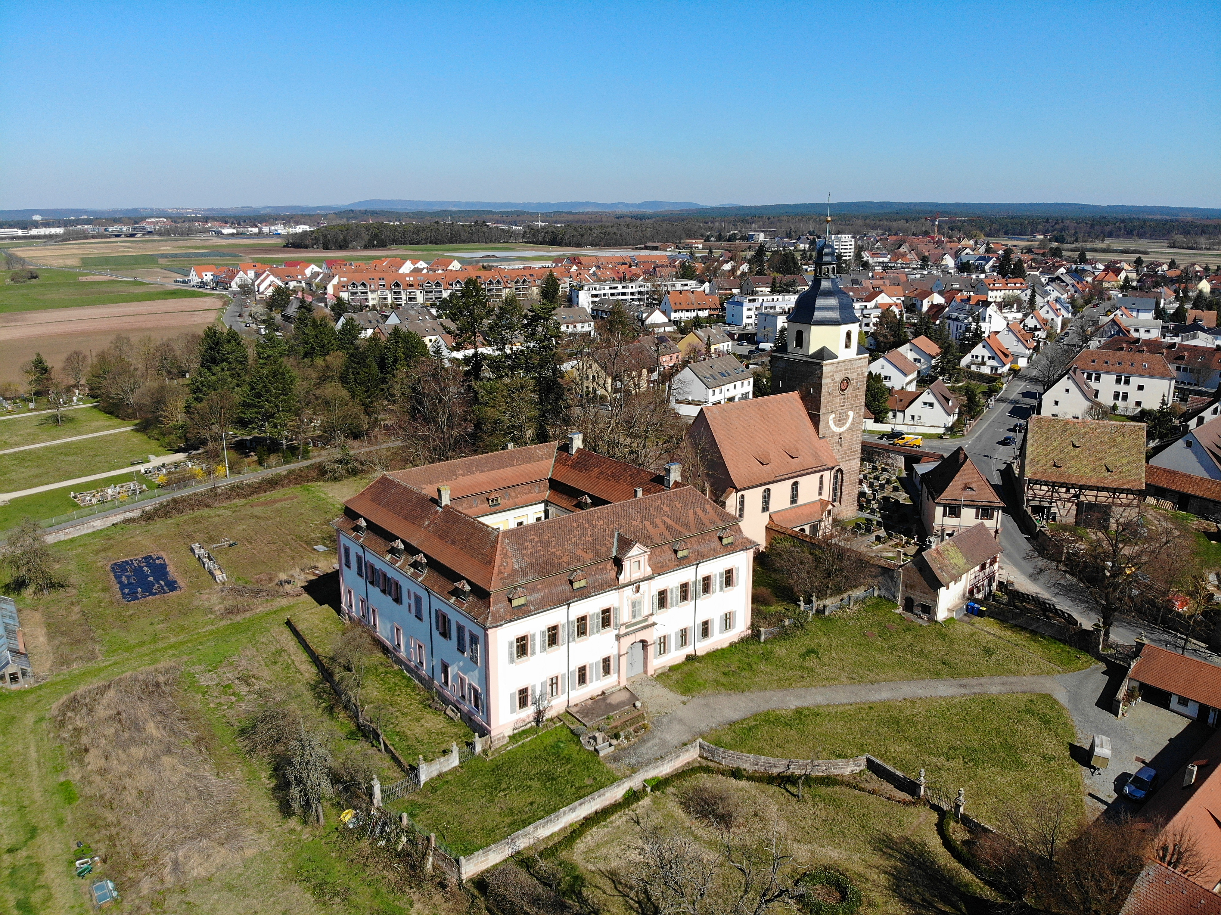 Schloss Großgründlach Luftaufnahme (2020)